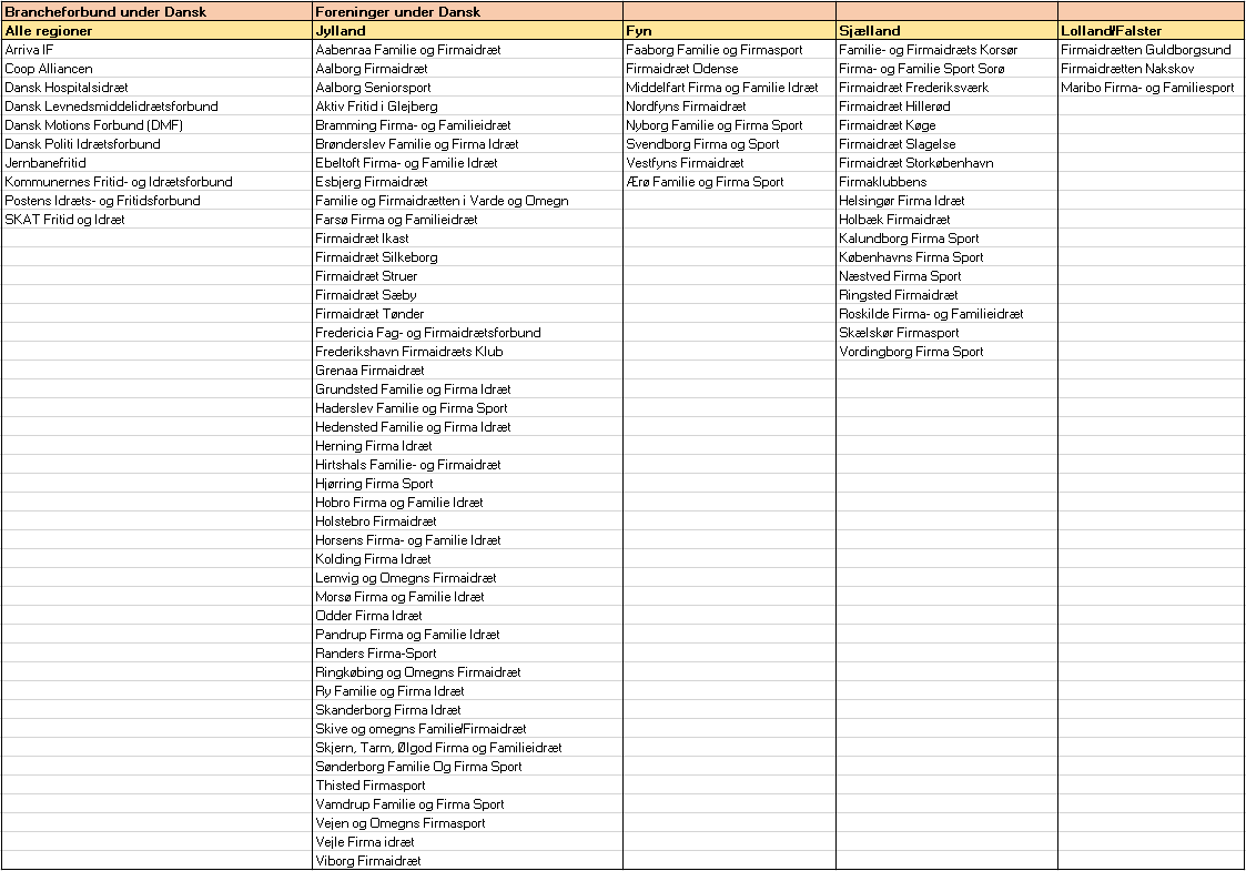 Foreninger